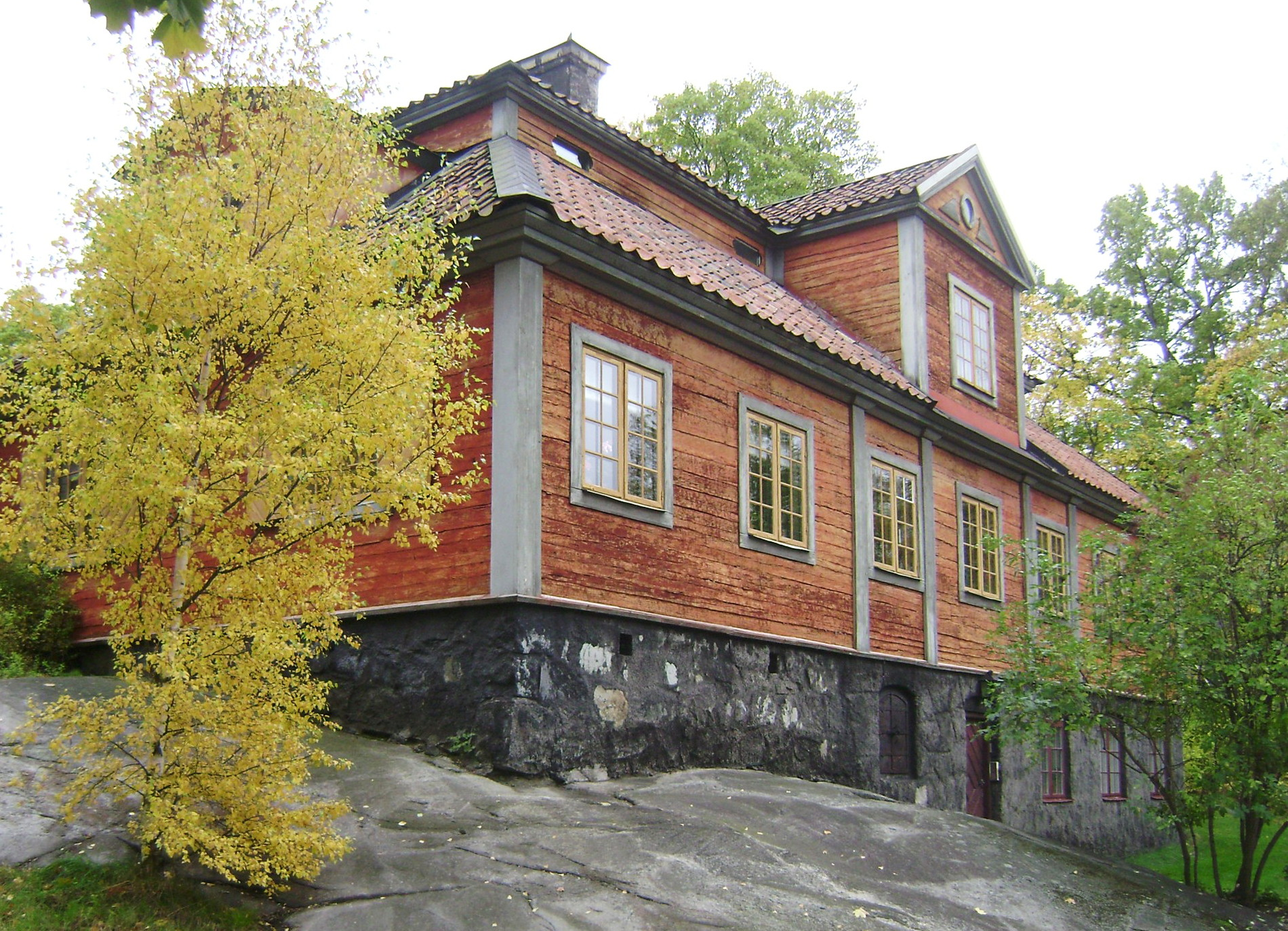 Sweden. Stockholm. Djurgården. Skansen